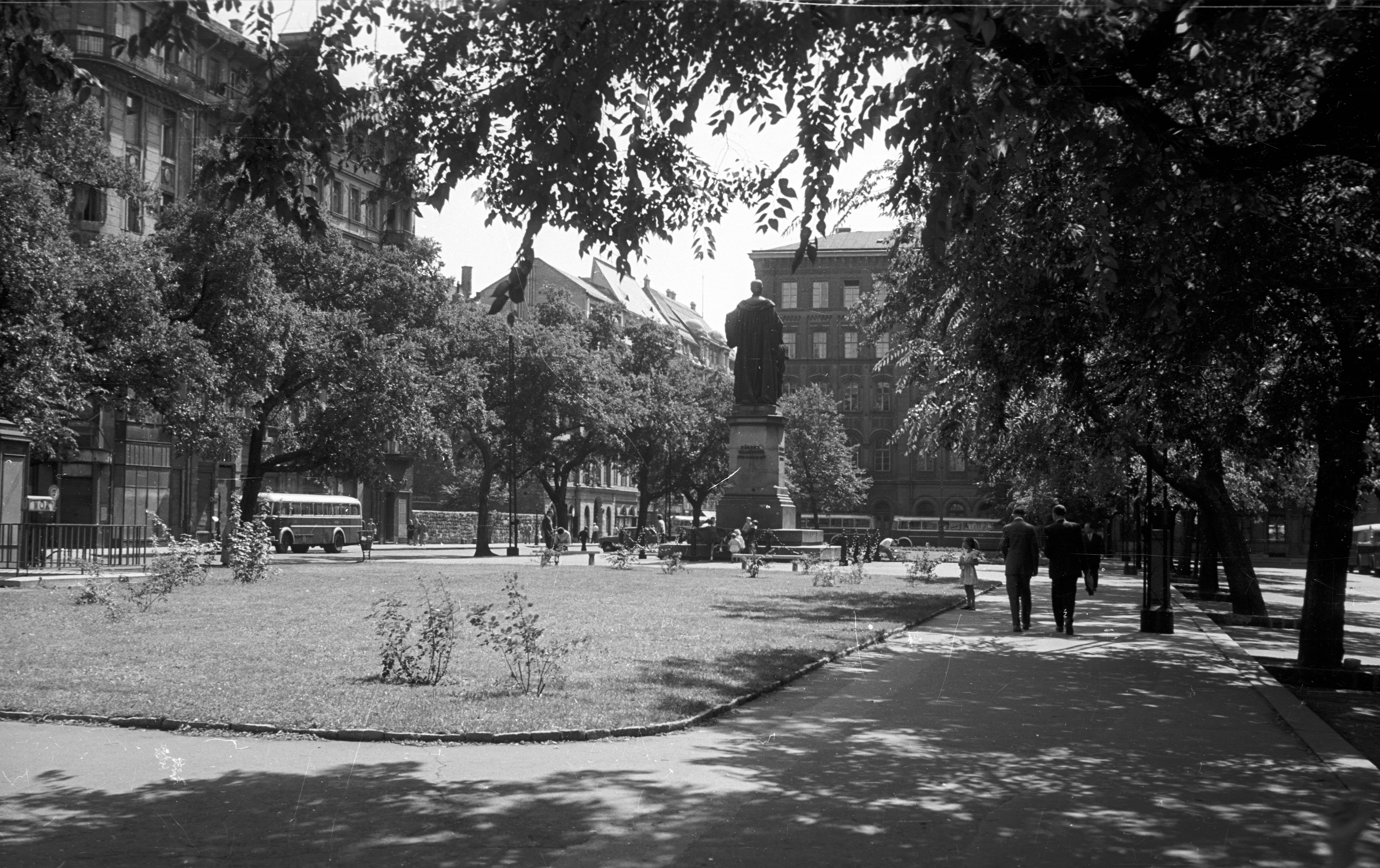 József nádor tér. Location: Hungary, Budapest V. Tags: Budapest Title: József nádor tér.